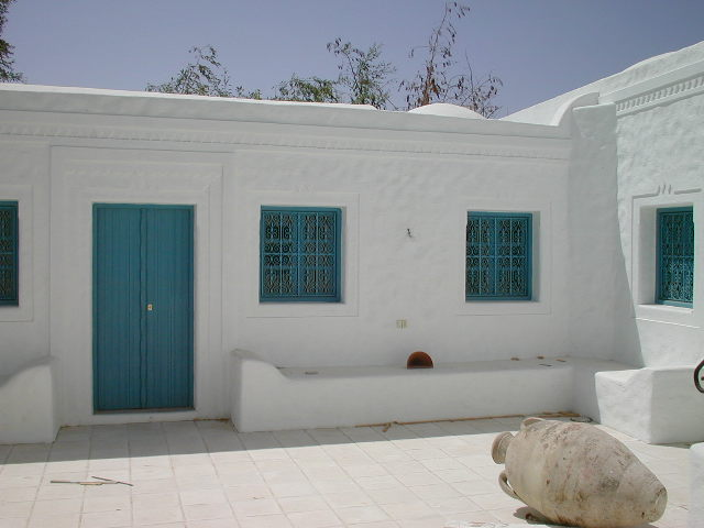 Cour intérieure d'un houch djerbien